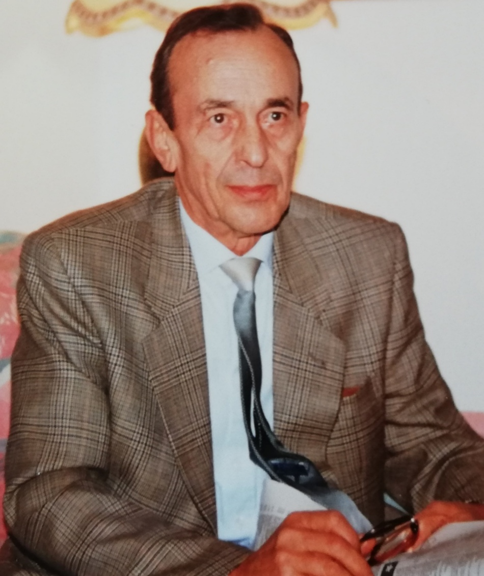 Eugenio Corsini